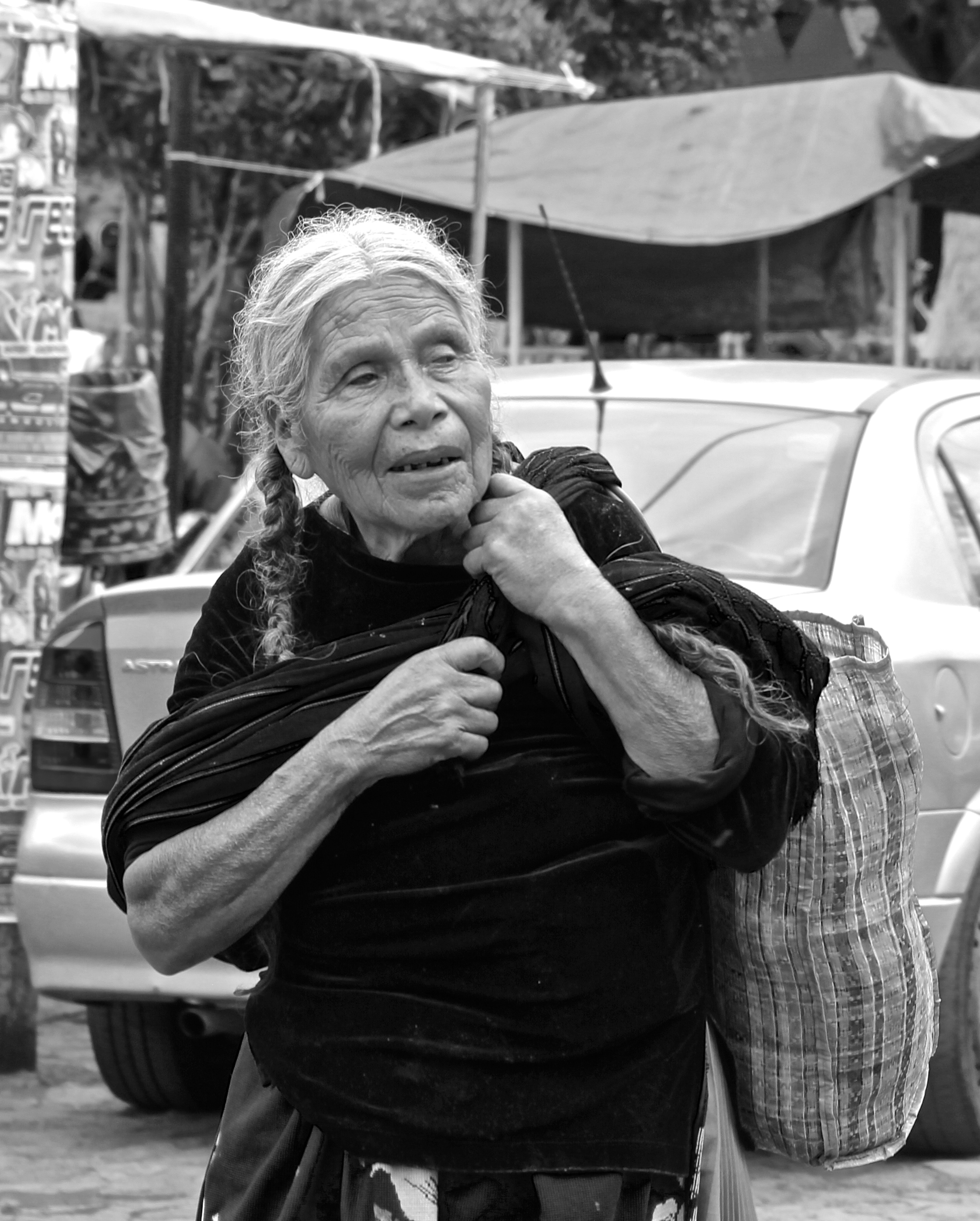 Fotografía tomada en la plaza pública de Capula, Michoacán, México